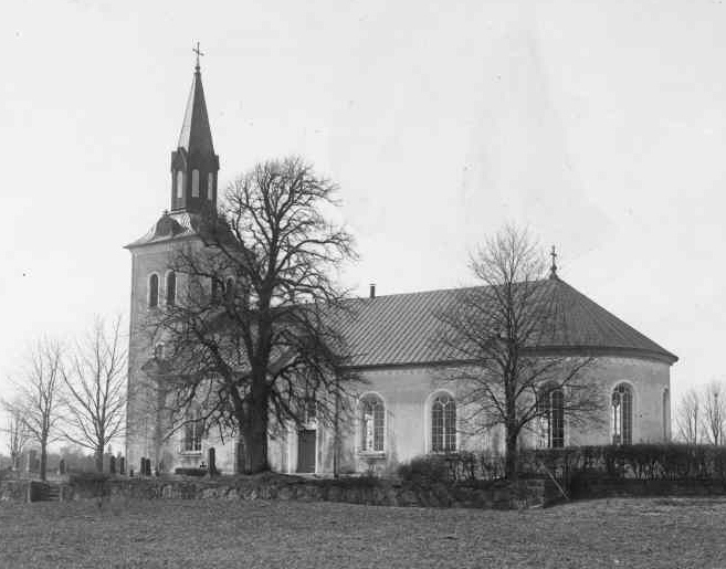 Lidhults kyrka